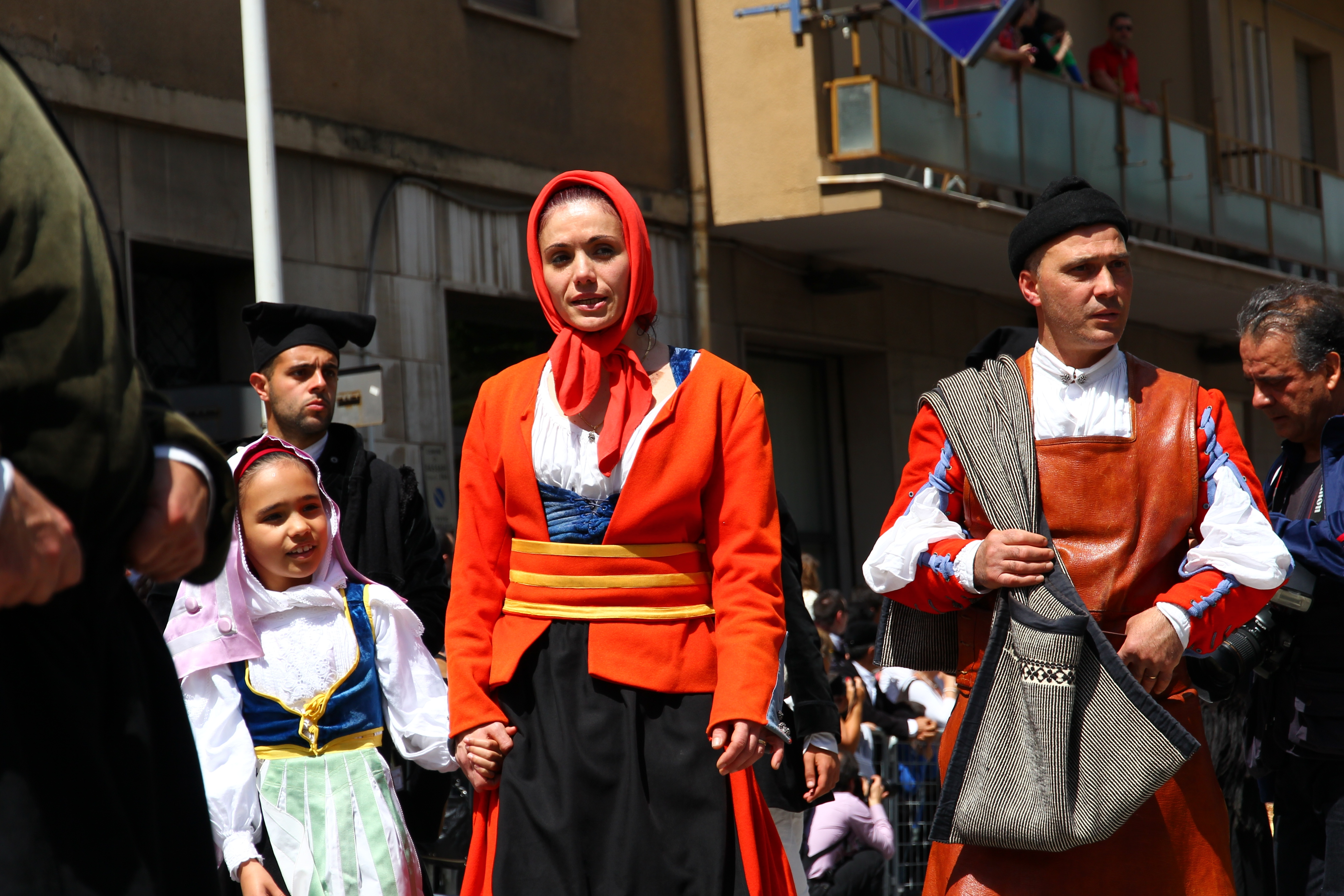 Cavalcata Sarda 2013 (Sassari)